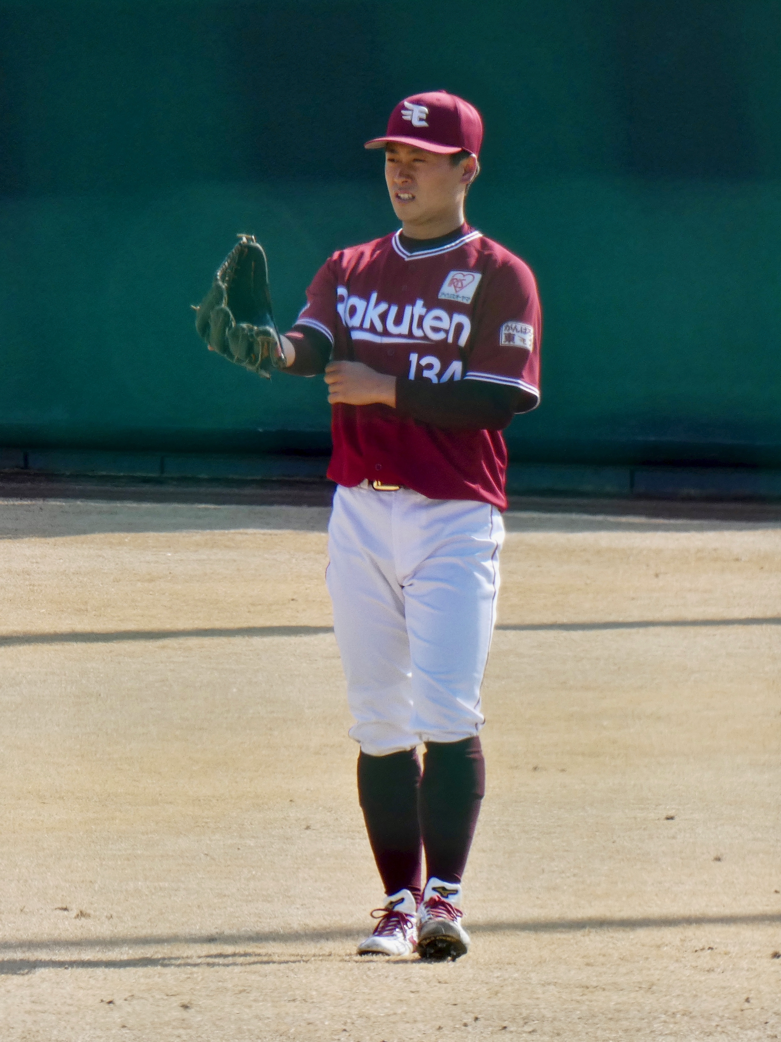 ヤクルト戸田球場にて